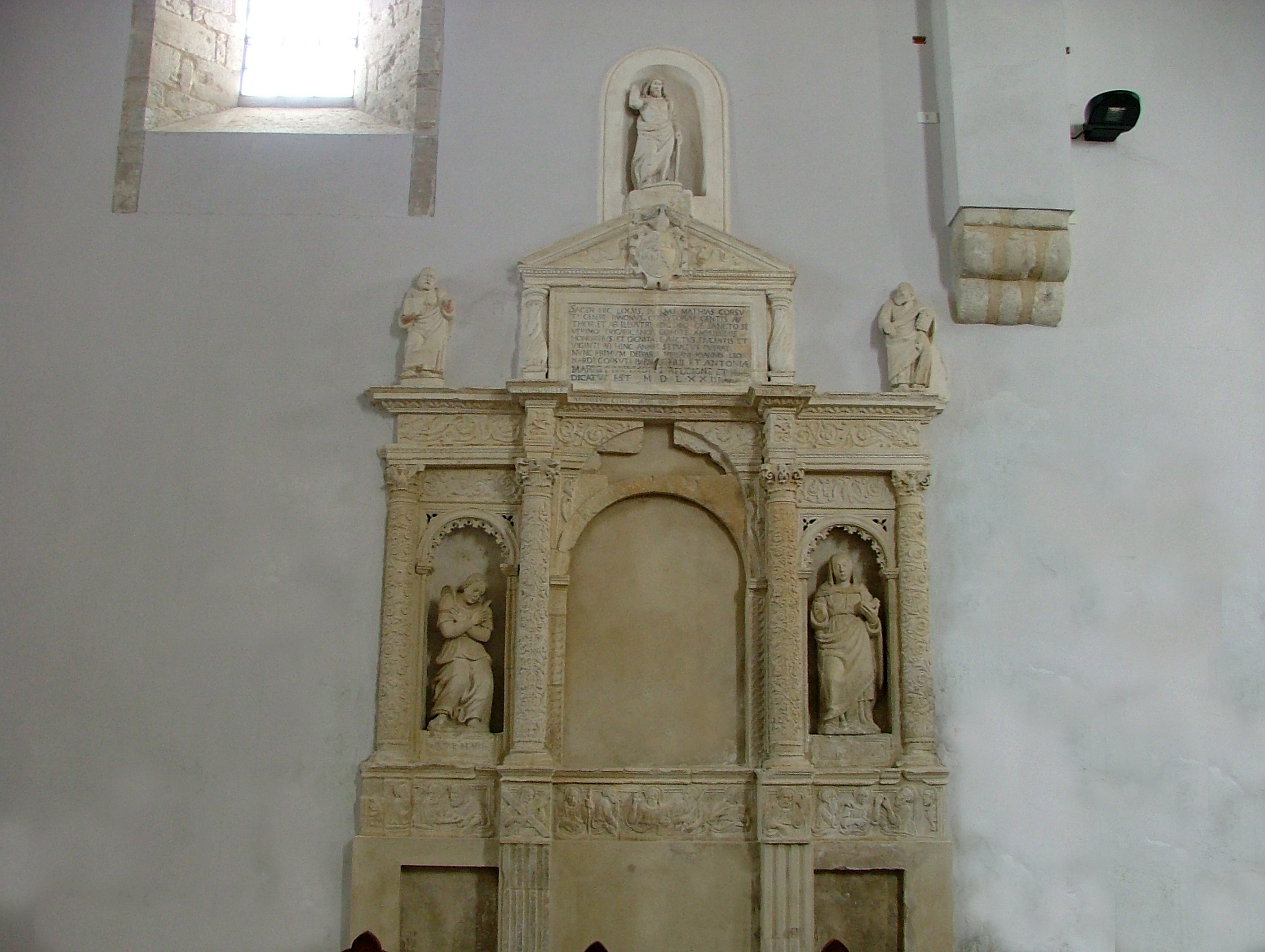 Altare del 1573, in pietra scolpita, fatto realizzare dalla famigia Corsuto(Corsado), di probabile scuola leccese. Rocco Stasi, fatta da me, sono l'autore. GFDL, sono l'autore Licensing Categoria:Immagini esclusivamente in GNU FDL